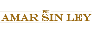 Logo de Por amar sin ley